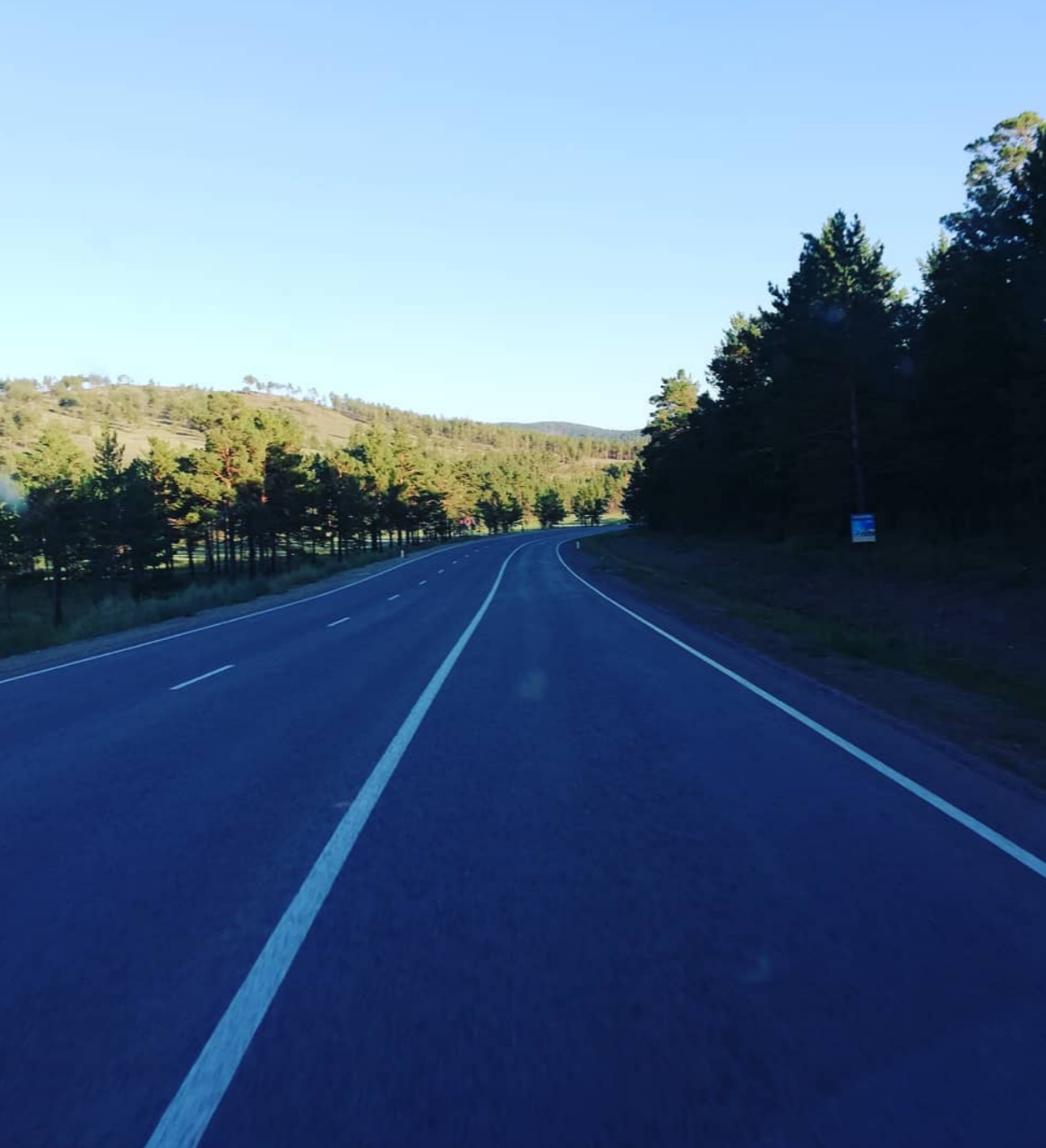 The A340 motor road near the city of Gusinoozersk